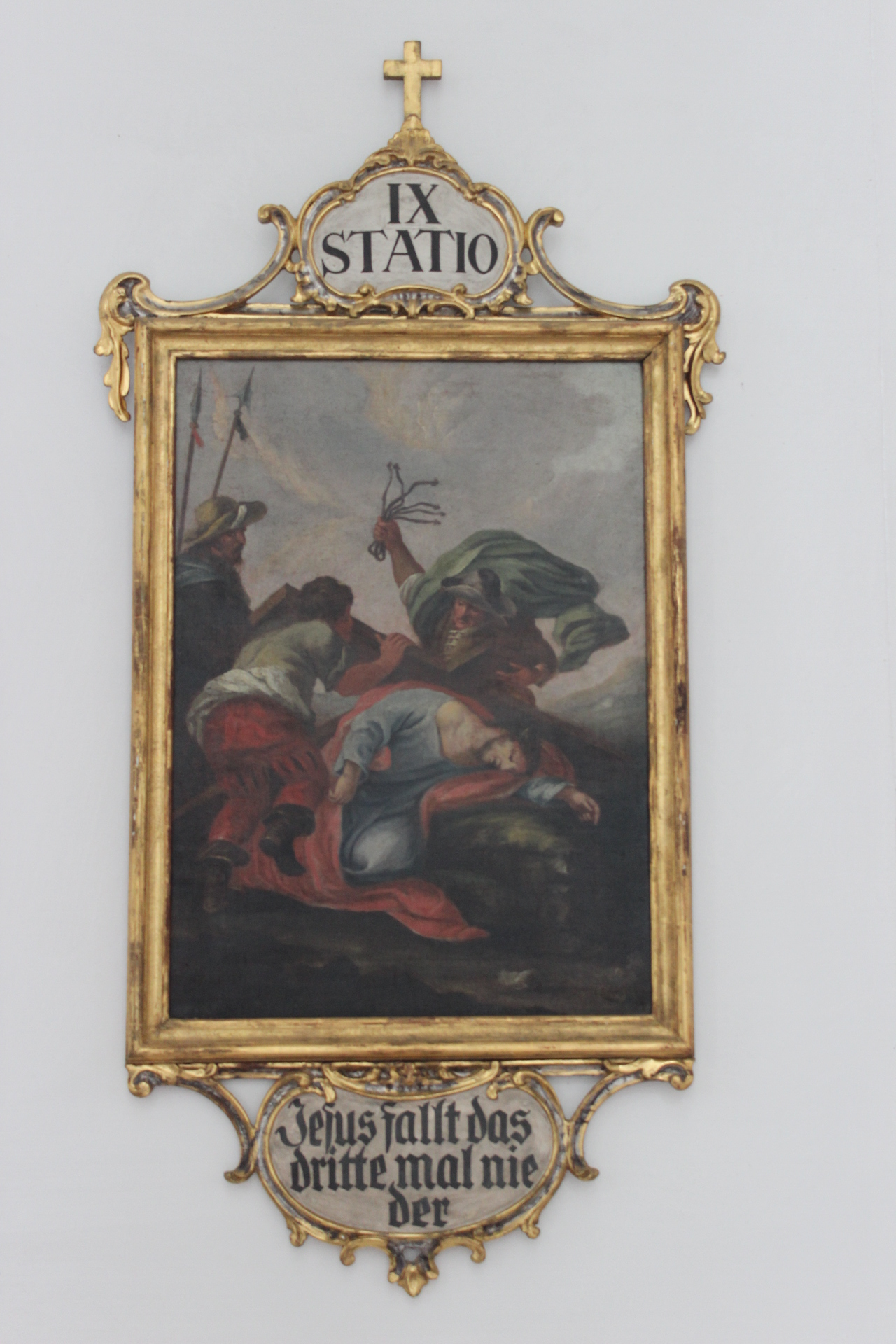 9. Station des Kreuzwegs der Heidelberger Jesuitenkirche